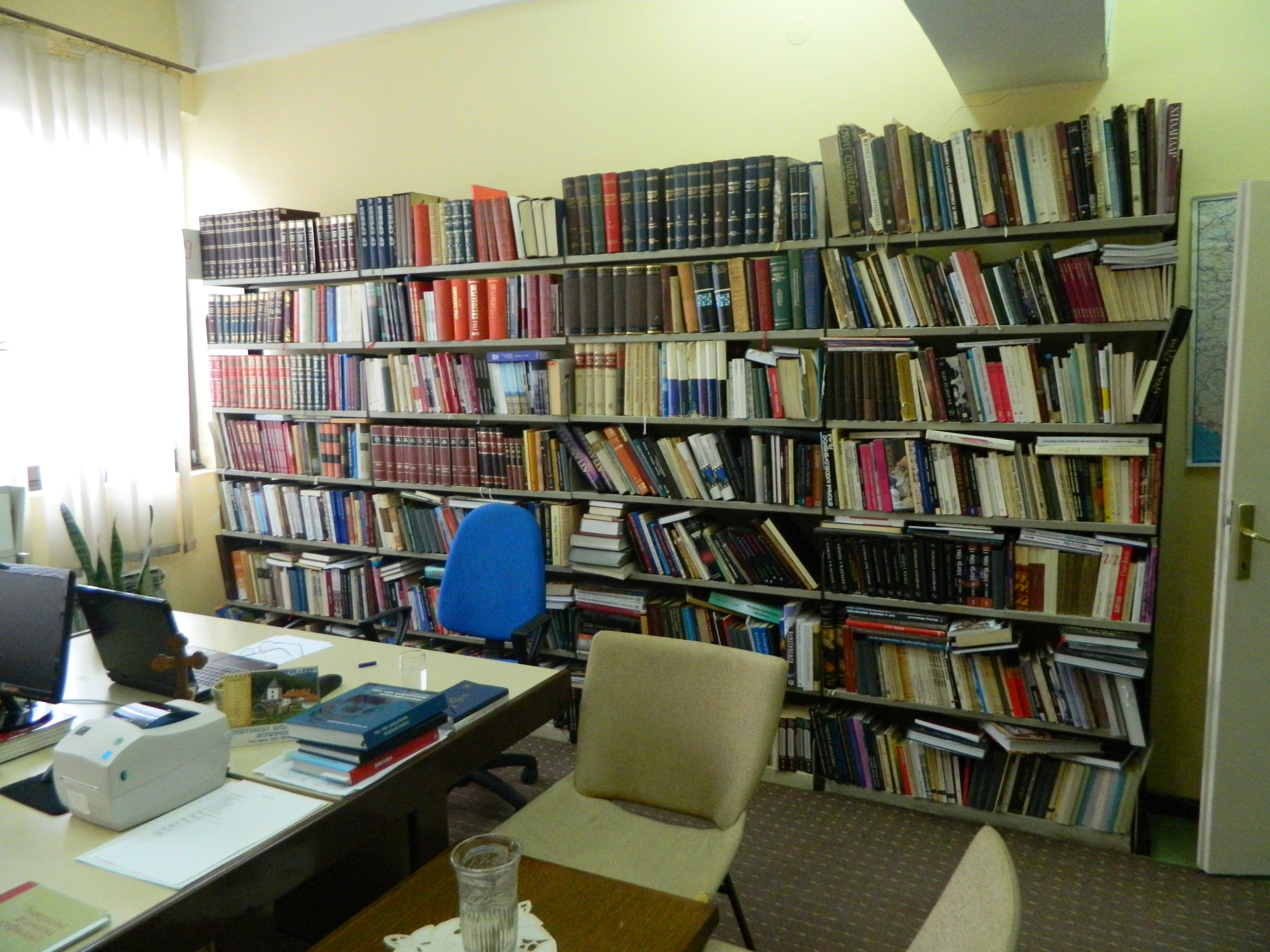 Biblioteka Varvarin, obrada fonda